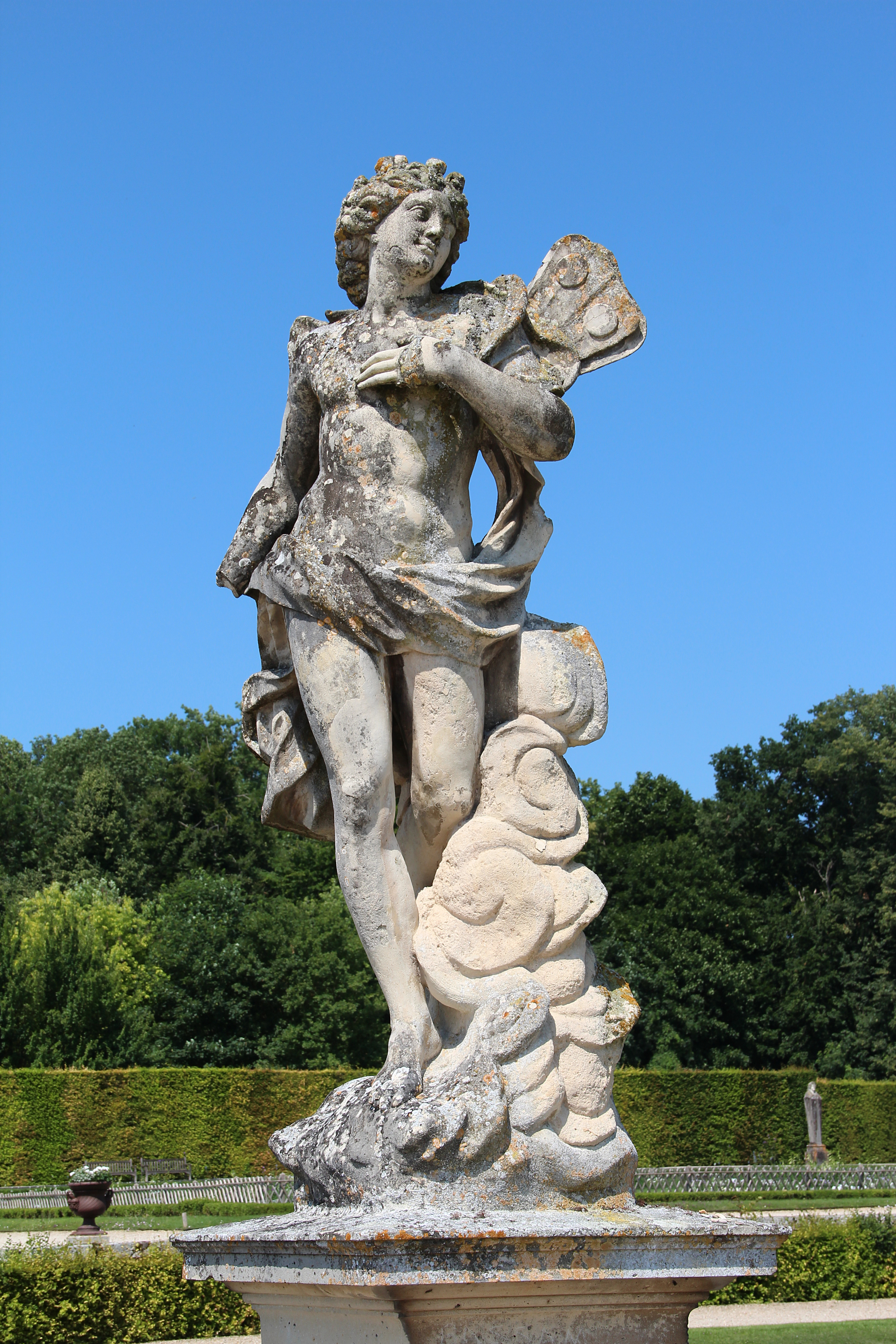 « Zéphyr », sculpture réalisée par un artiste inconnu pour orner le côté sud du parterre de fleurs du château de Vaux-le-Vicomte - Maincy (Seine-et-Marne, France).